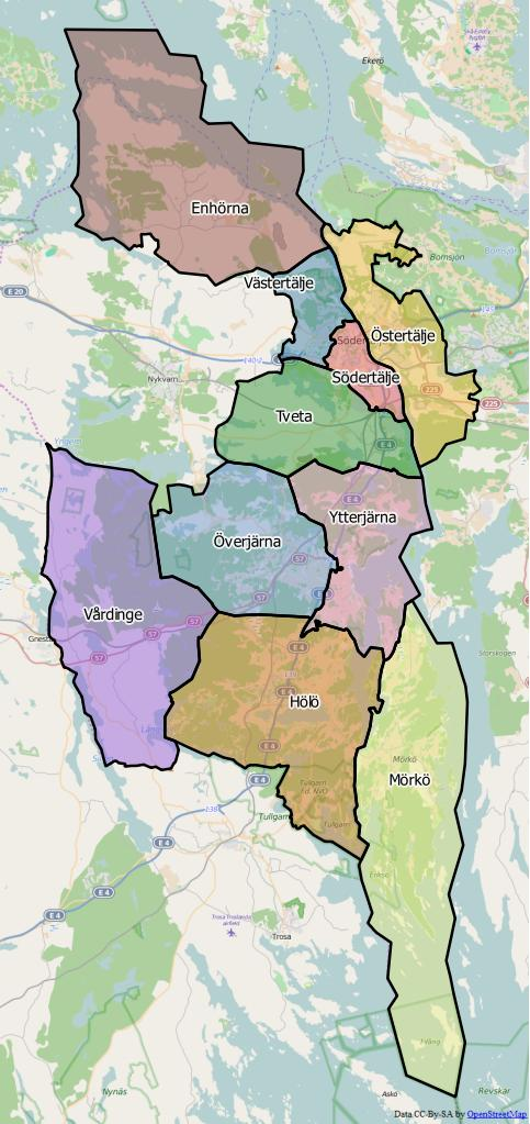 Distriktsindelningen i Södertälje kommun World file: 119.63162415833343744 0 0 -119.63162415833343744 1922726.50792519329115748 8259948.98614782560616732